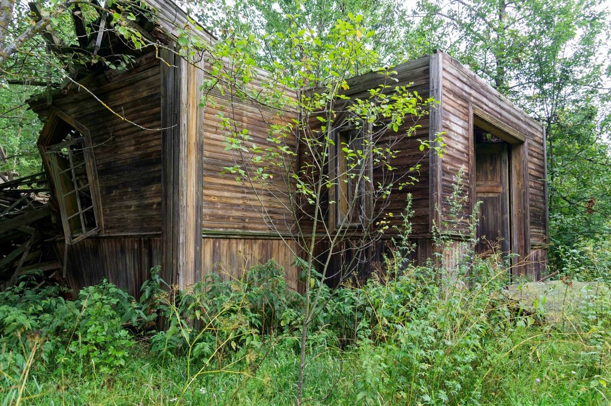 Бабруйшчына. Разбураны касцёл Св. Антонія